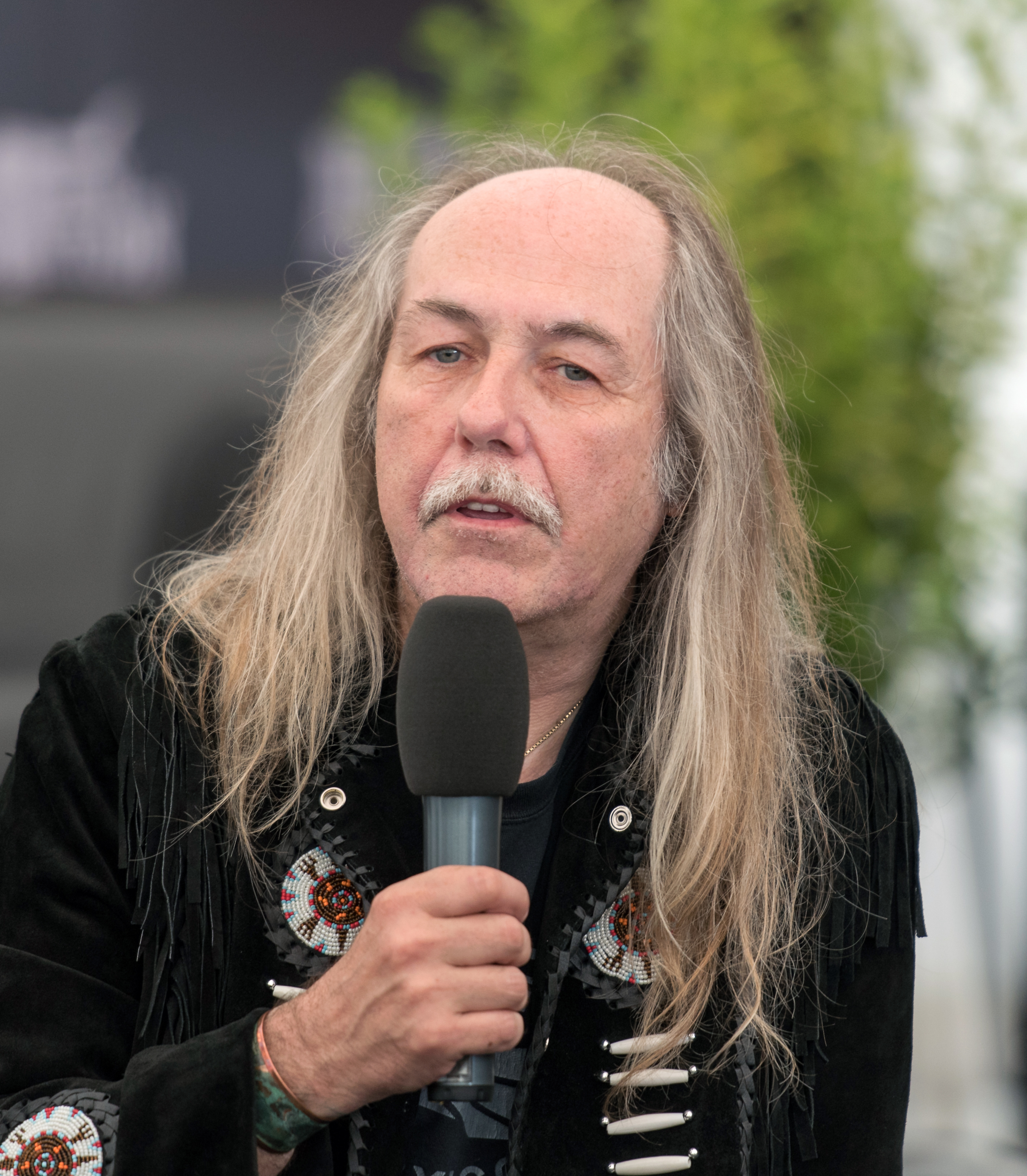 Uli Jon Roth bei einer Pressekonferenz beim Wacken Open Air 2017